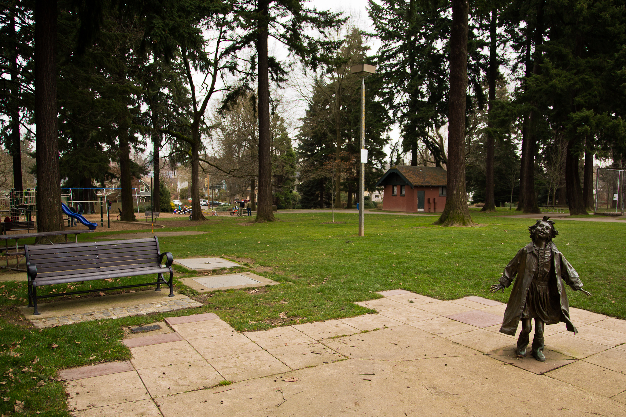 Grant Park, Portland, Oregon